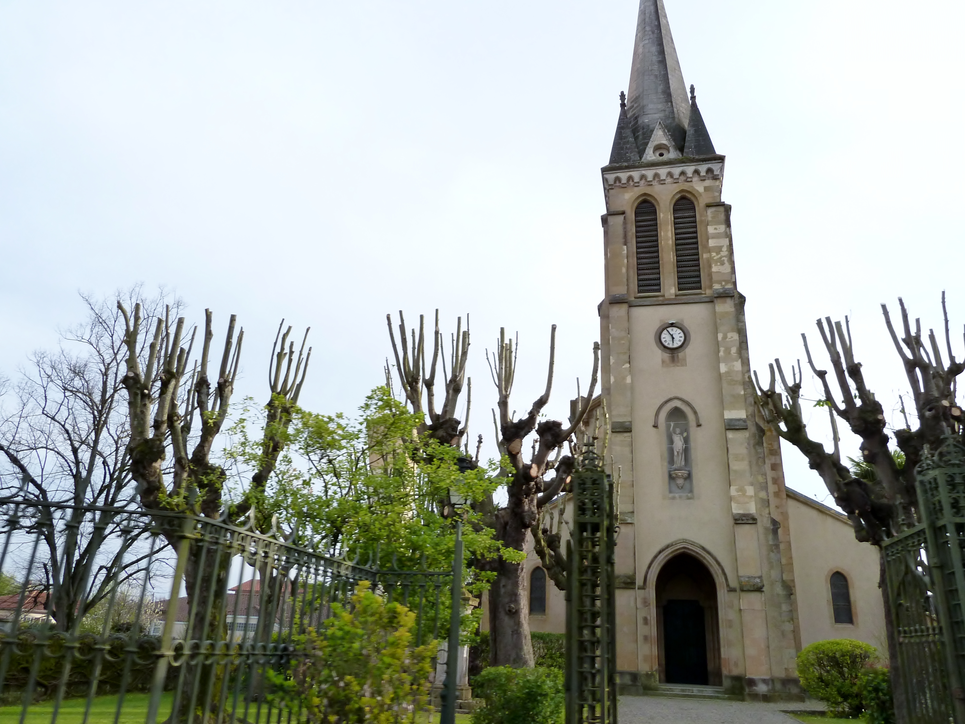 Église de Garlin